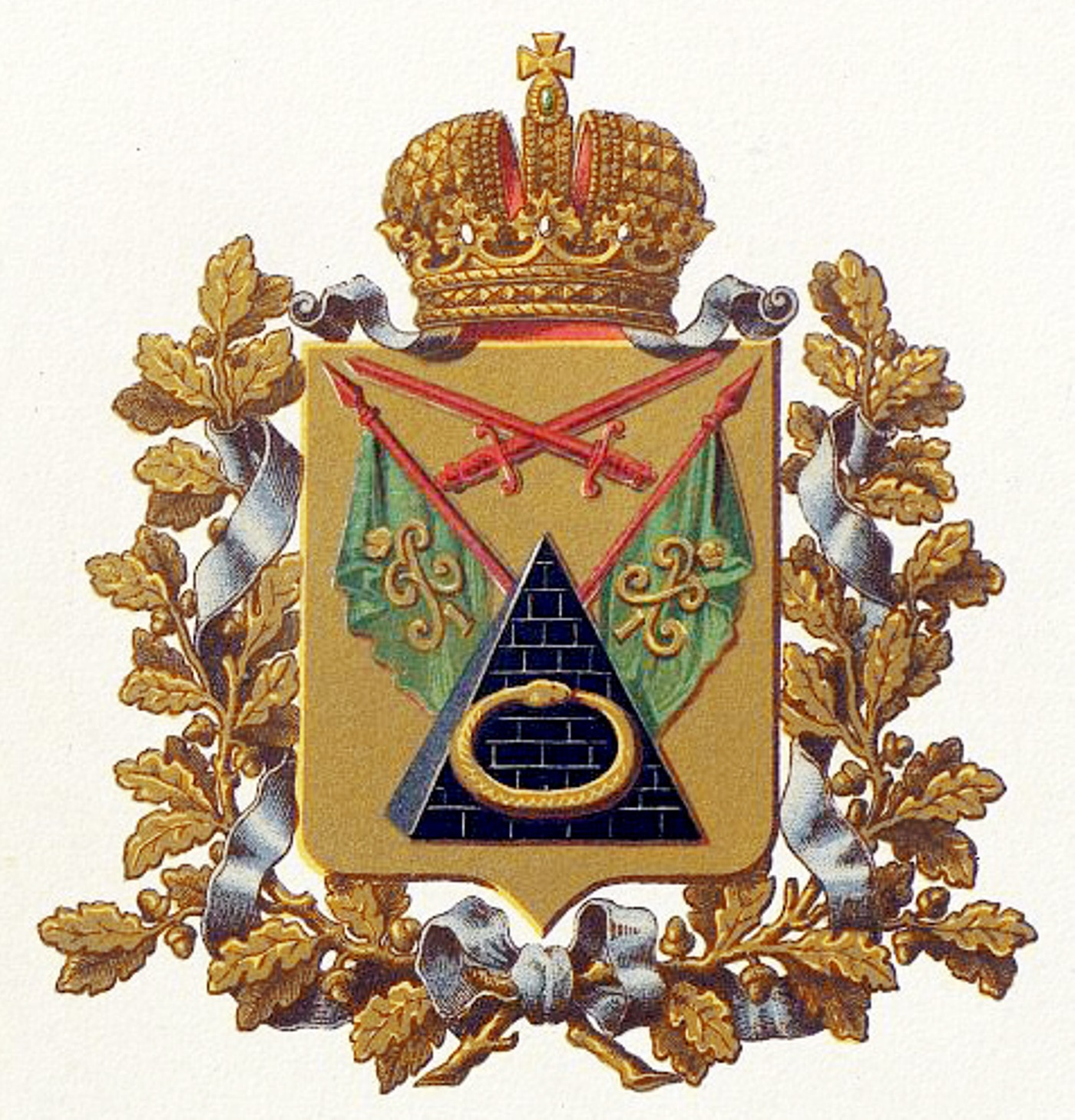 Official Russian Empire coat of arms Poltava Governorate. Герб Российской Империи Полтавской губернии в Гербовнике МВД. Утверждён Императором Всероссийским Александром Вторым.